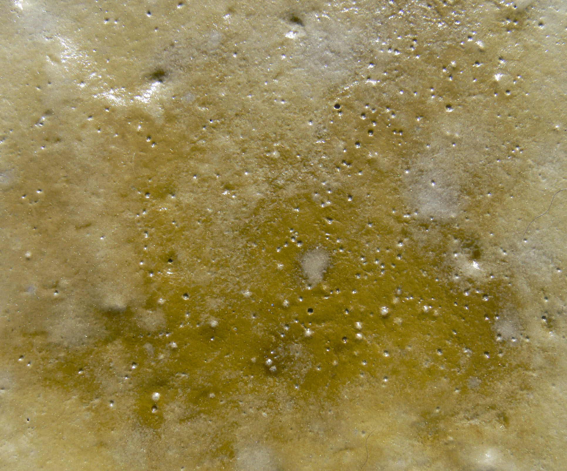 Biofilm sur vase (se formant en quelques heures, de temps que la marée descende), Port de Saint Goustan, Bretagne sud (Morbihan).